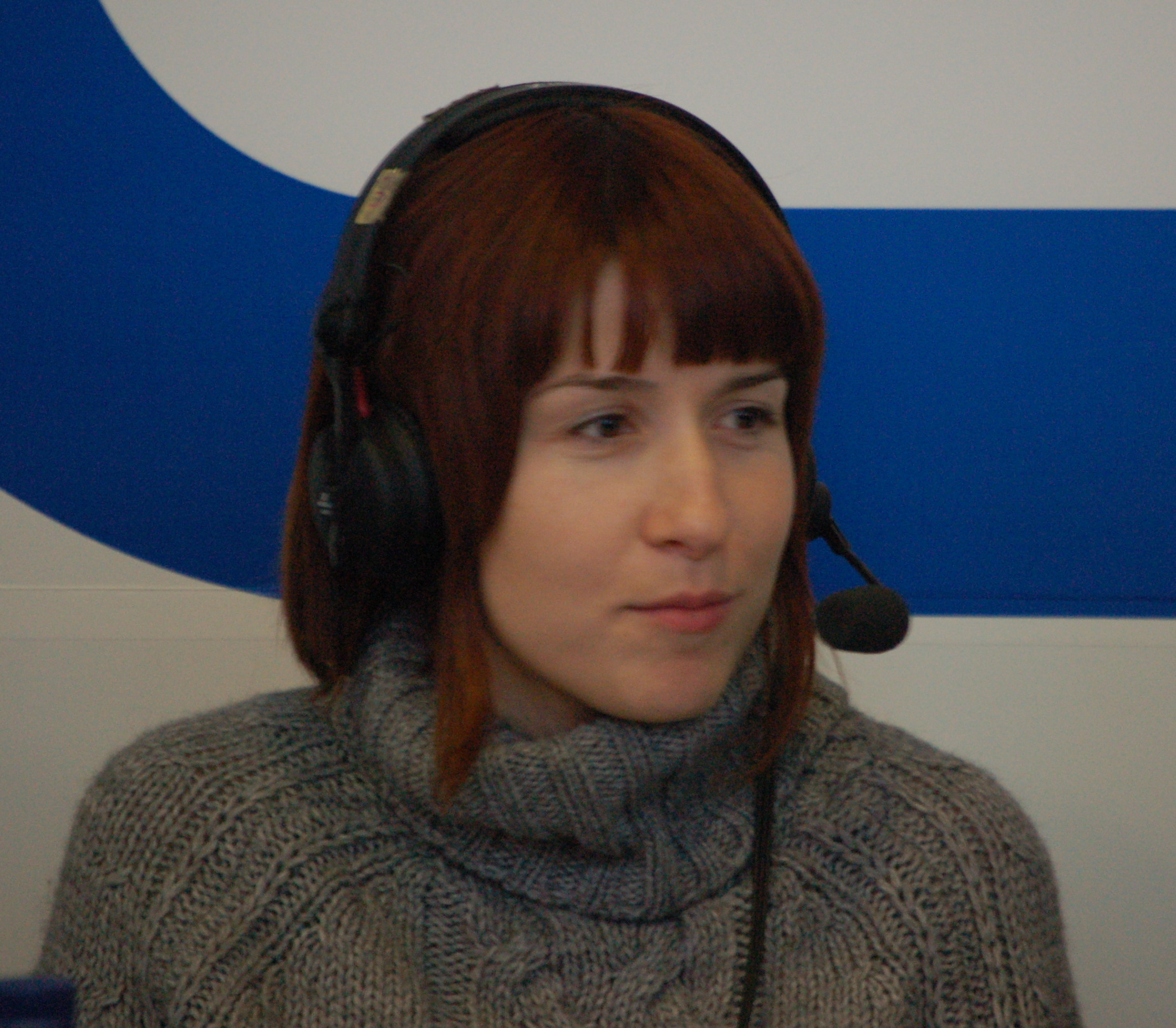 Belén Regueira gravando o programa Extrarradio da Radio Galega no Culturgal 2008